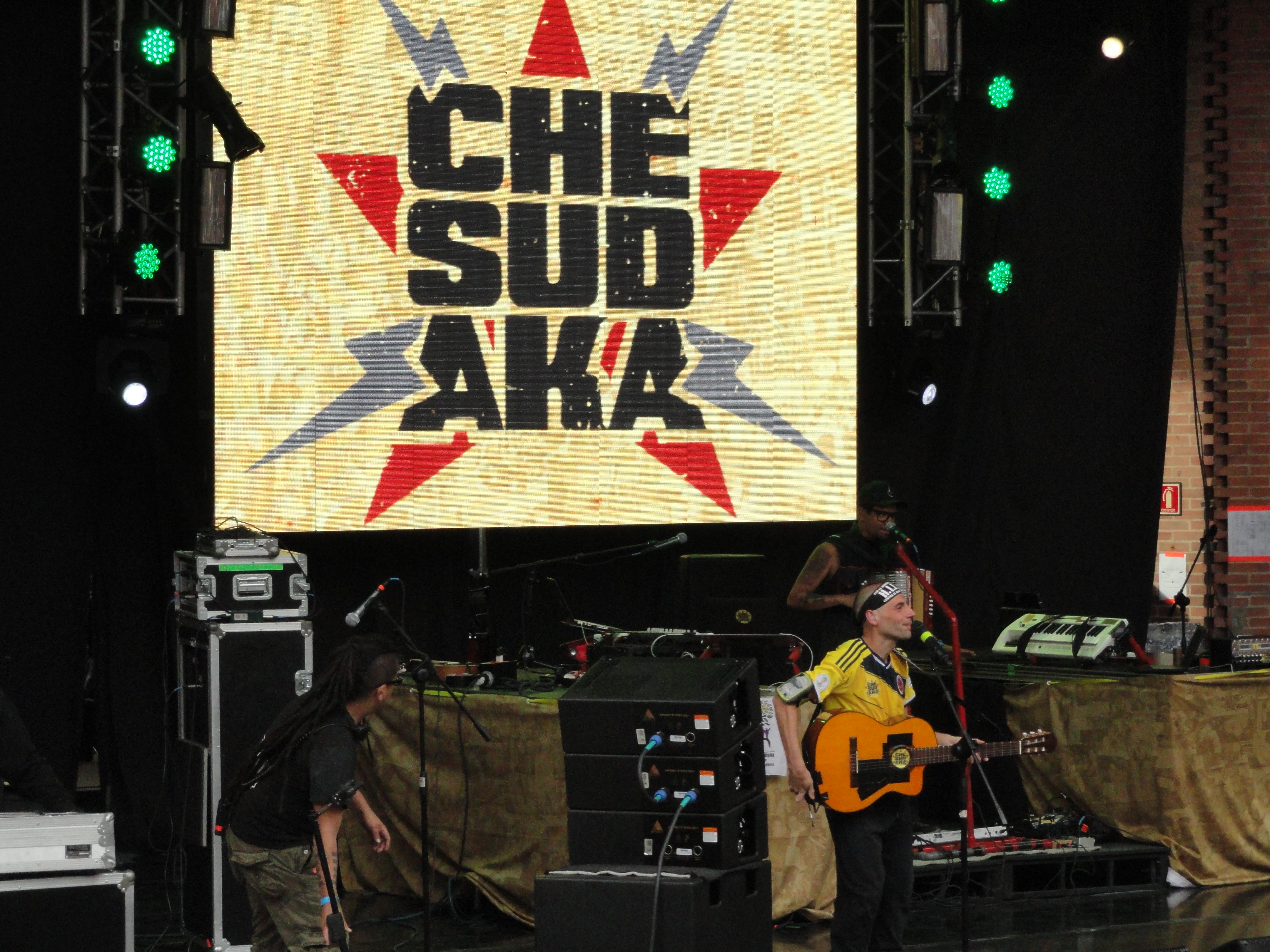 Che sudaka